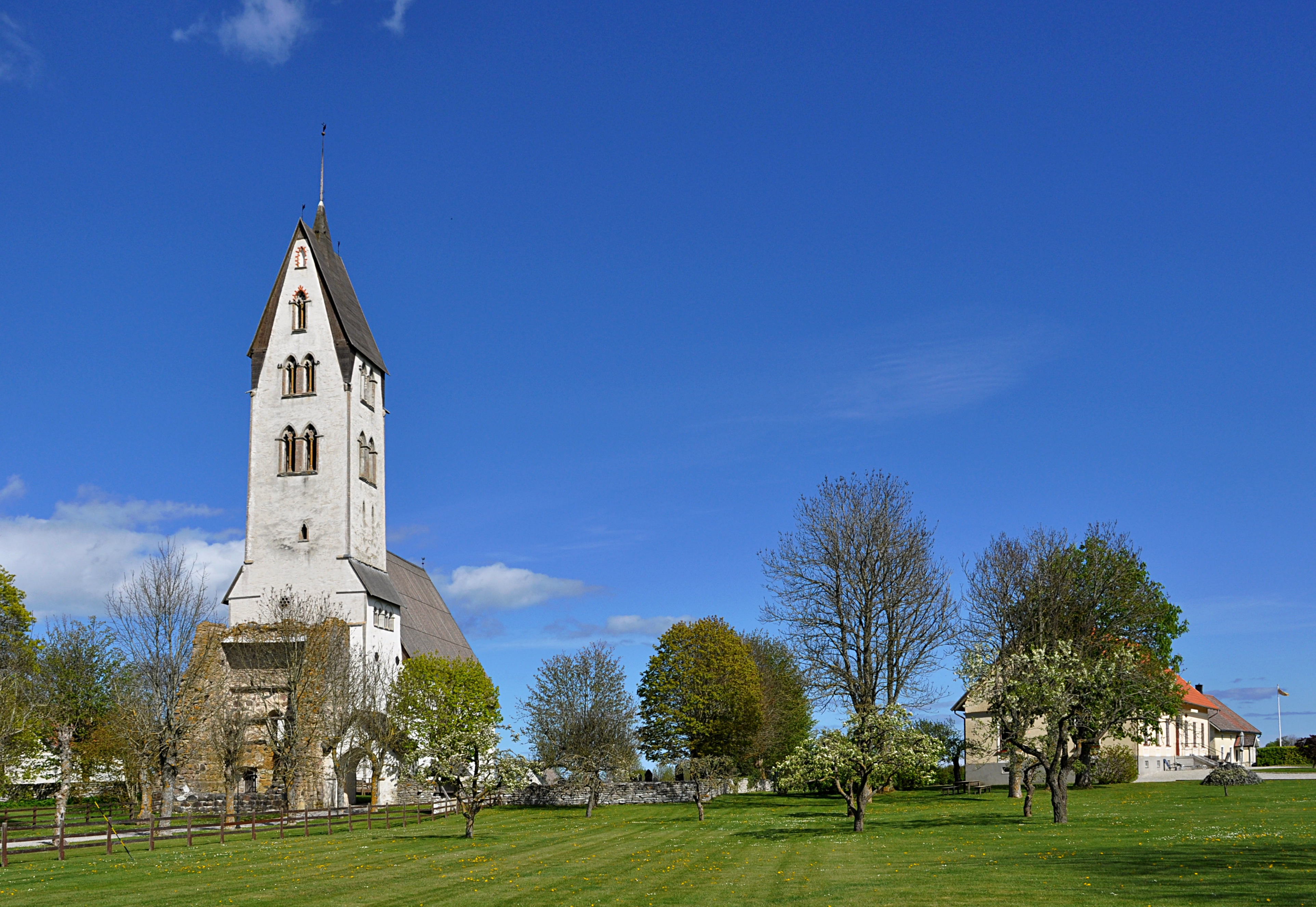 Gothems kyrka som hör till Gothems församling i Visby stift, Gotland.